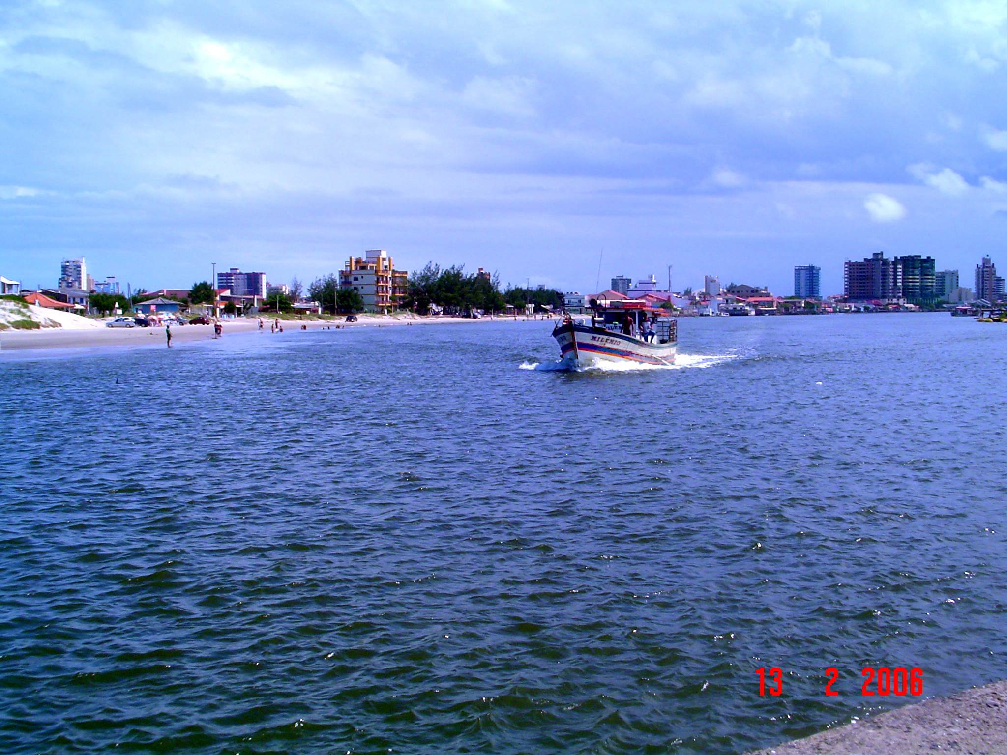 Vista, a partir da barra de Imbé, do Rio Tramandaí com o município de Tramandaí ao fundo.